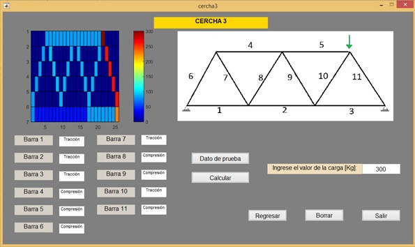 Interfaz 4 cercha 3